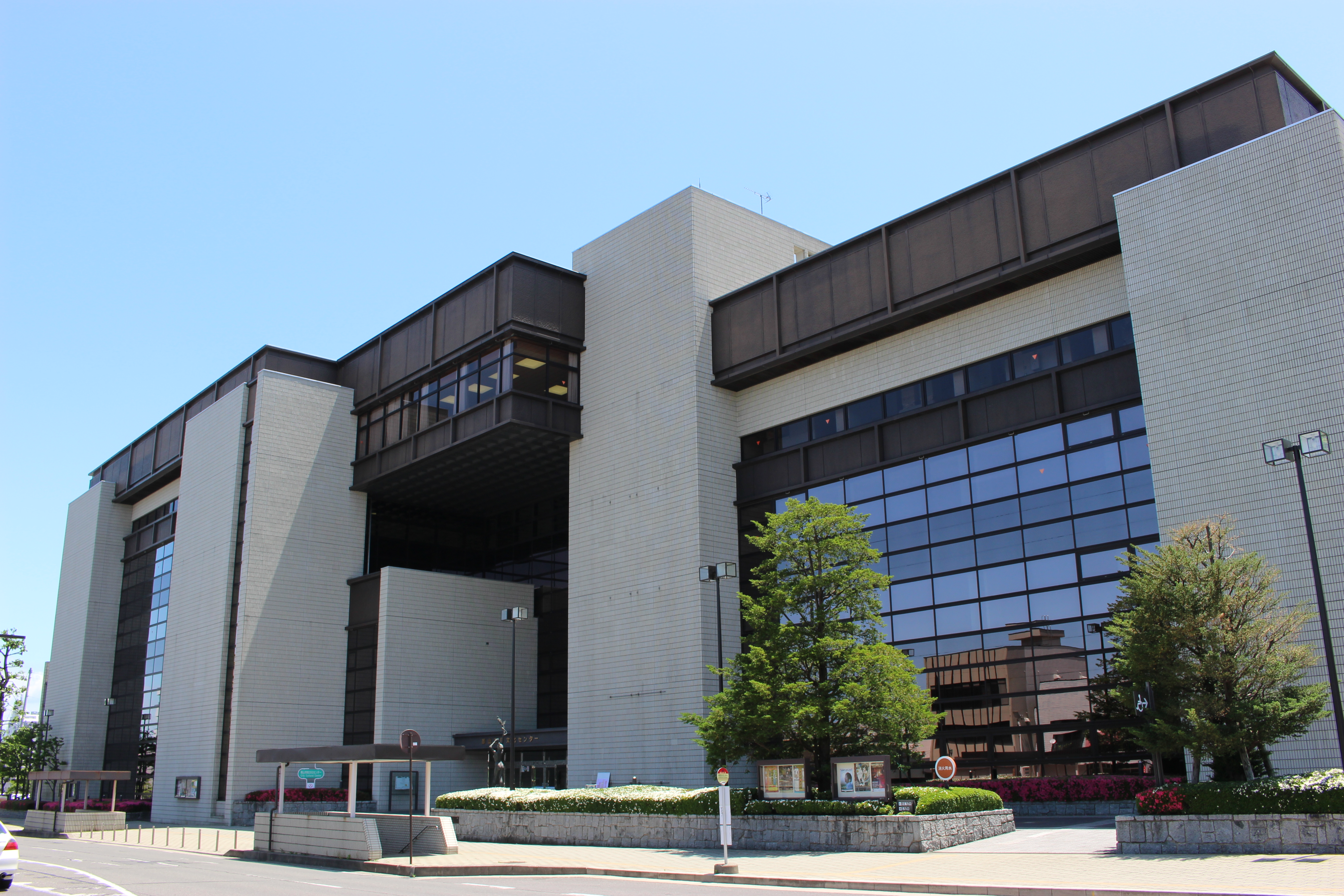 郡山市民文化センター